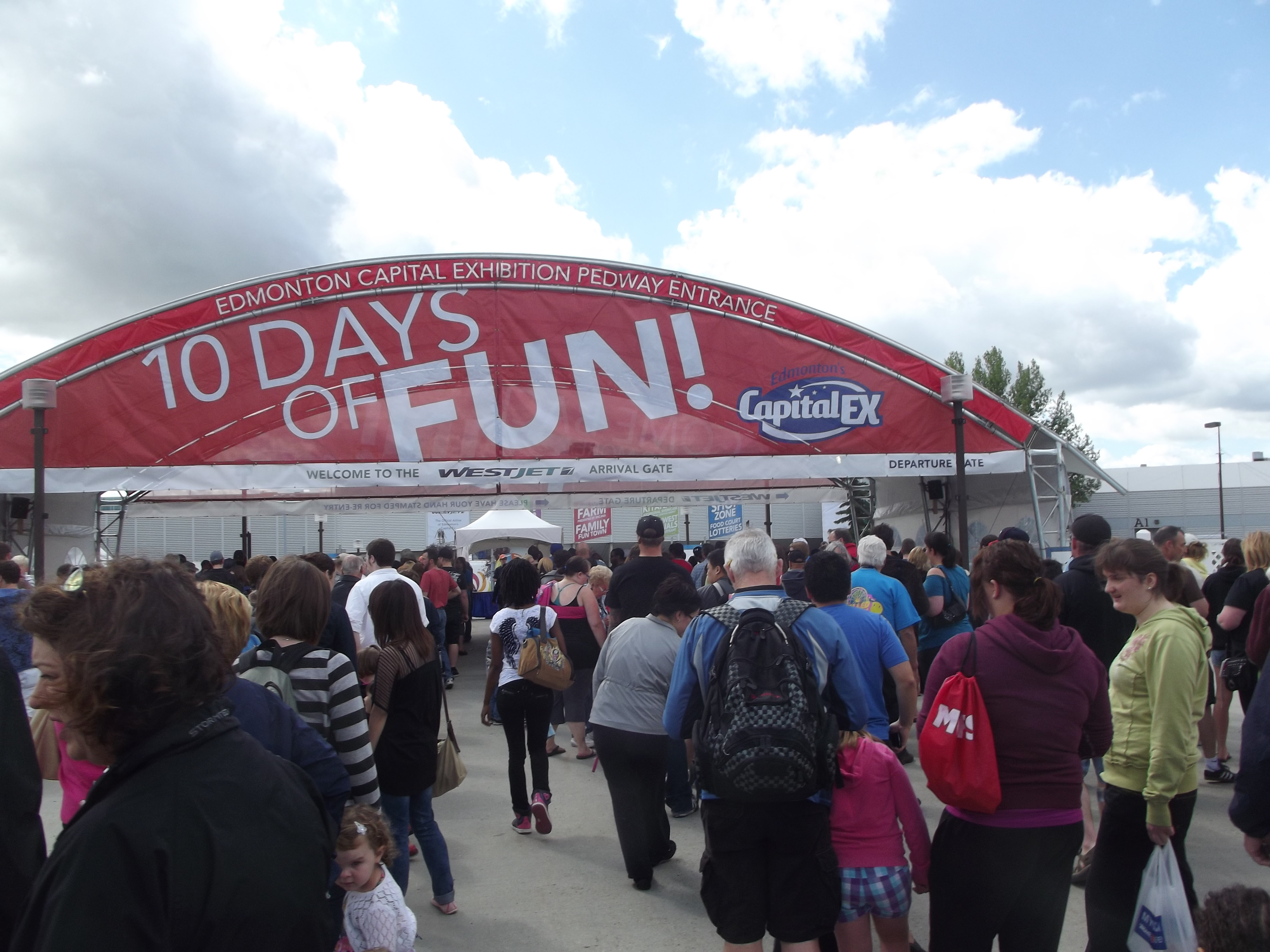 Entrance to Capital EX